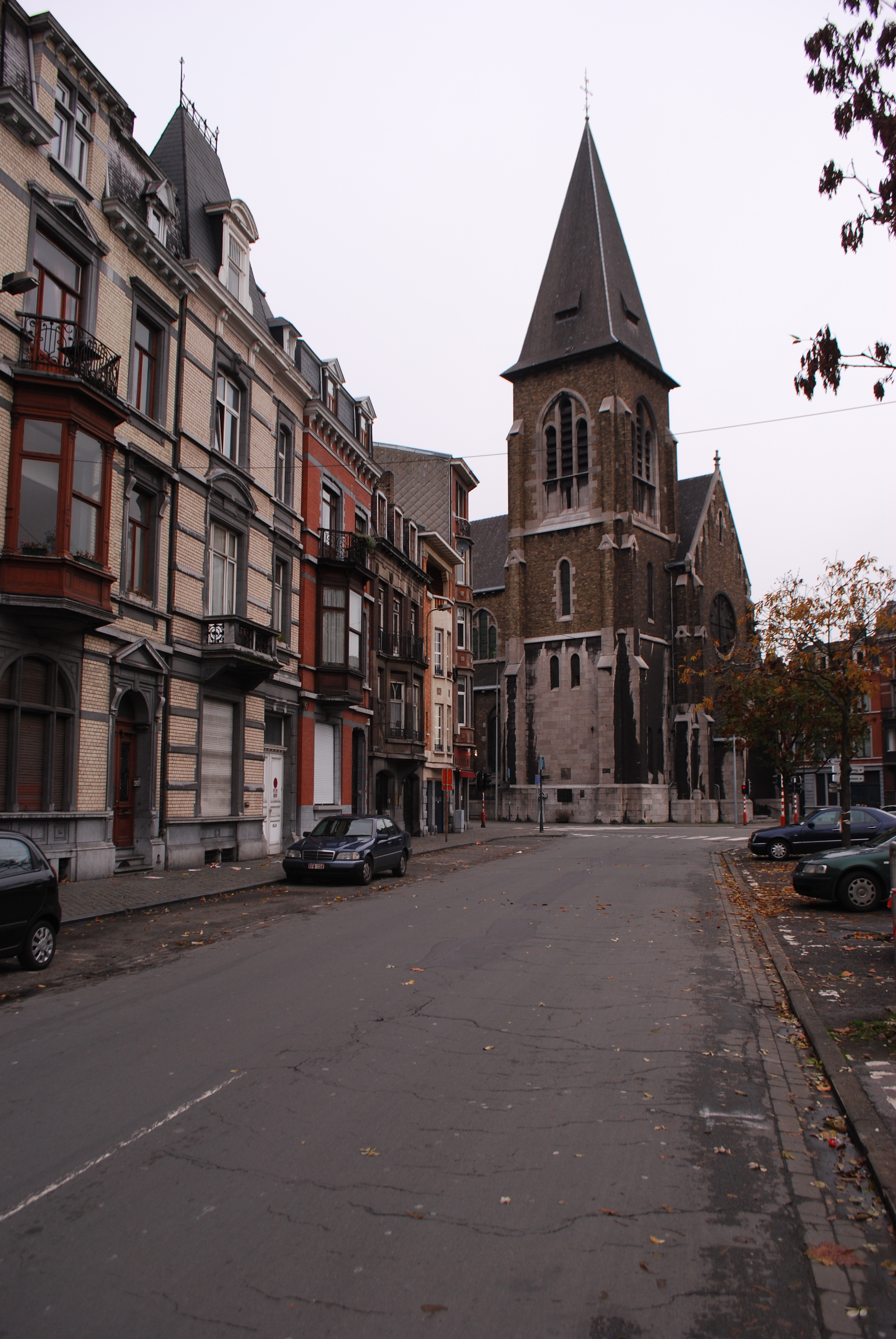 Le boulevard de l'Est, dans le quartier d'Outremeuse à Liège, vue vers l'église Saint-Pholien.